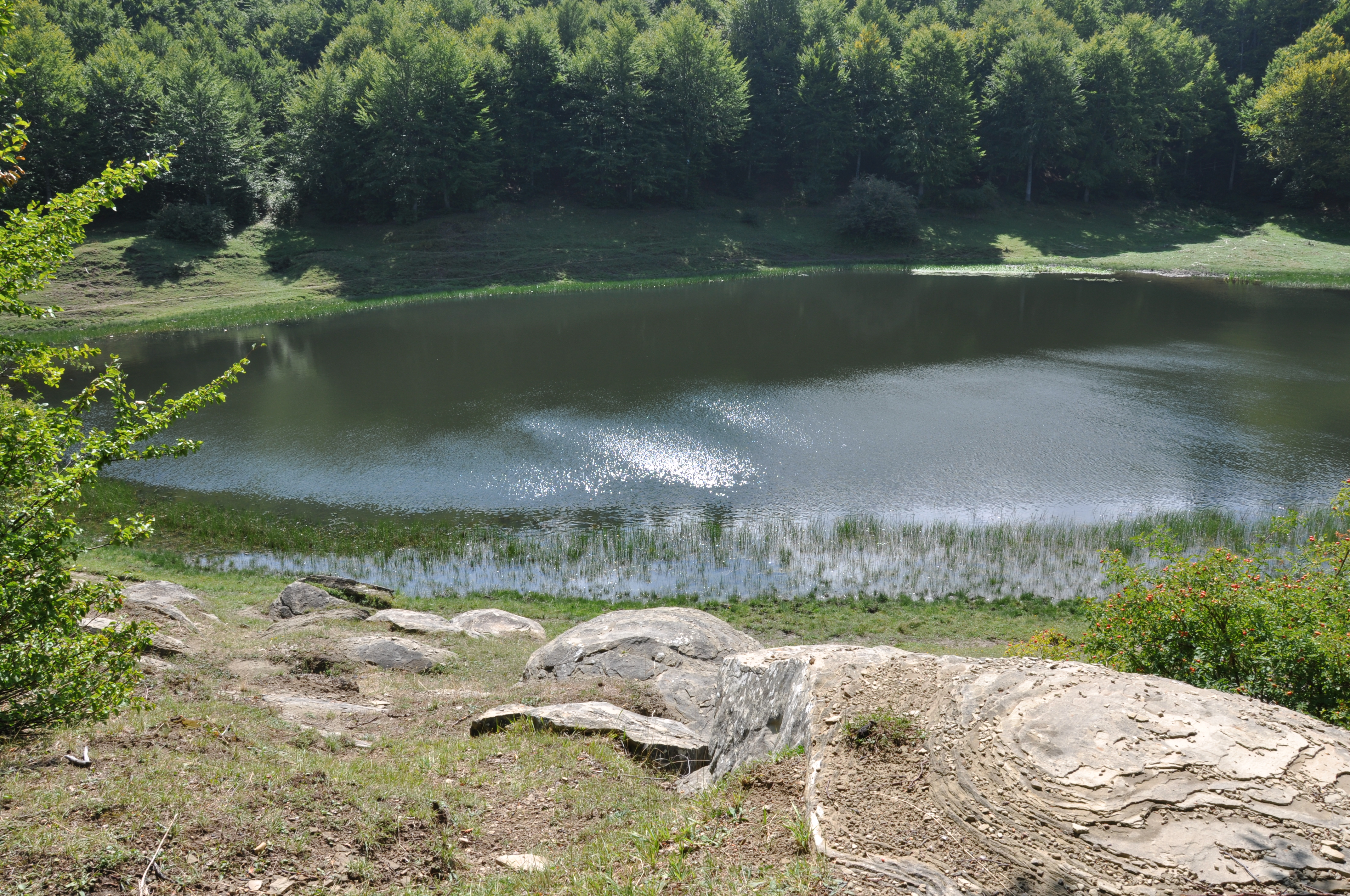 Oasi WWF Lago Secco - Comune di Accumoli - Provincia di Rieti - Italia This is a photo of a monument which is part of cultural heritage of Italy. The authorisation for taking photos of this object was provided by the World Wide Fund for Nature Italy.